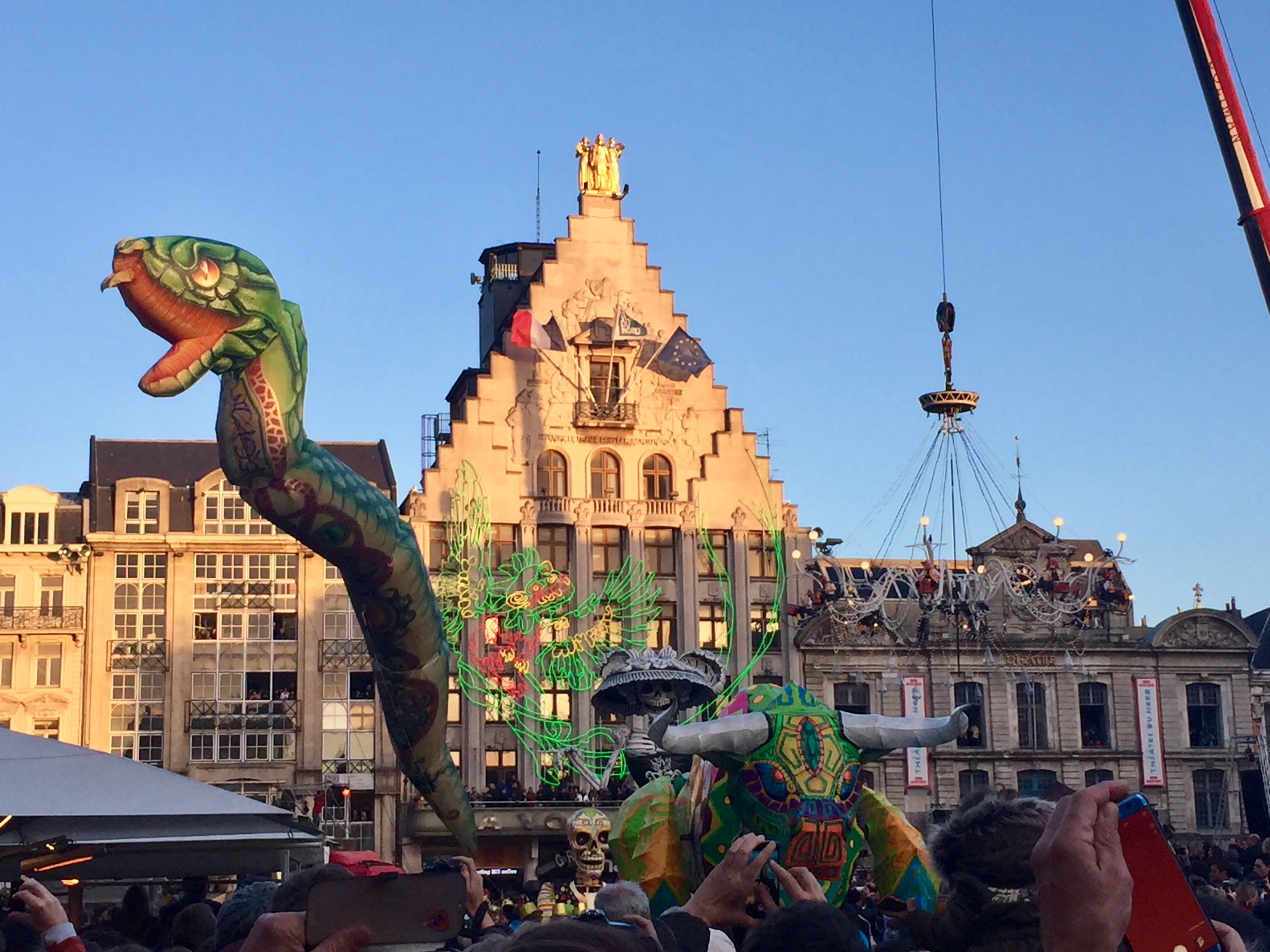 Parade Eldorado lille3000, mai 2019